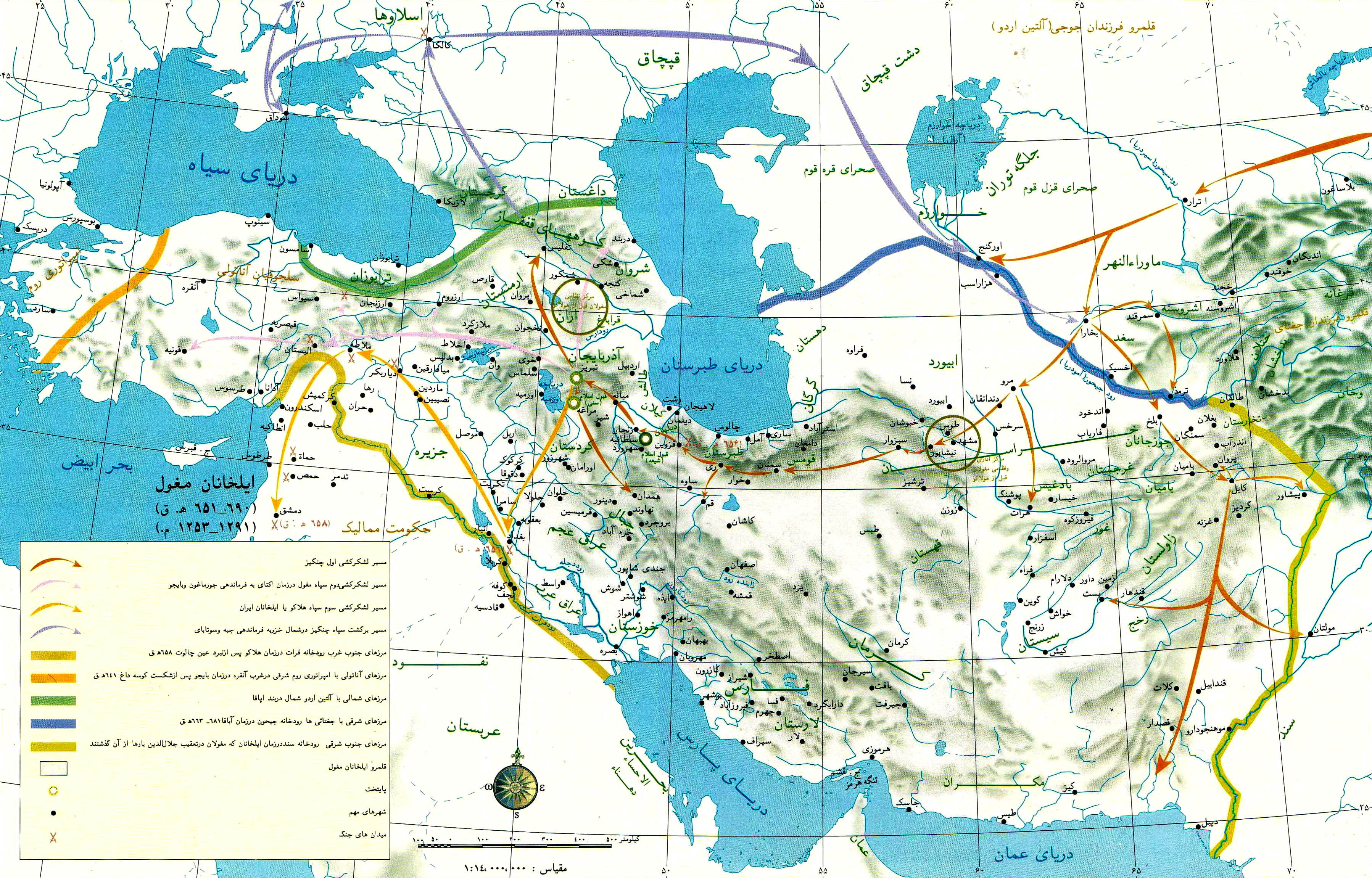 map of Iran during Mongol Ilkhanid dynasty, 1253-91 AD